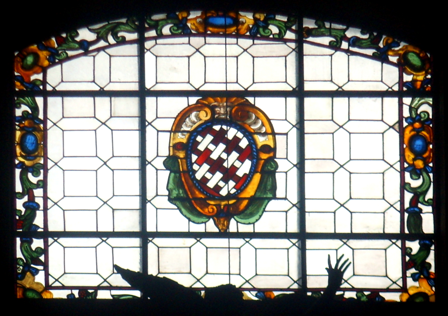 Stamma Salviati. Vetrata nella chiesa di San Marco, Firenze.